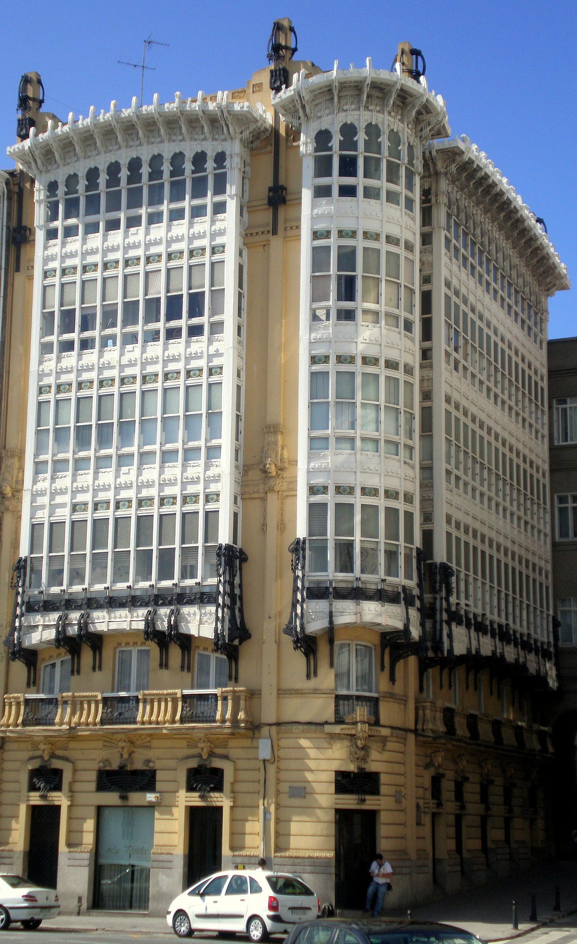 A Coruña, Porta Real